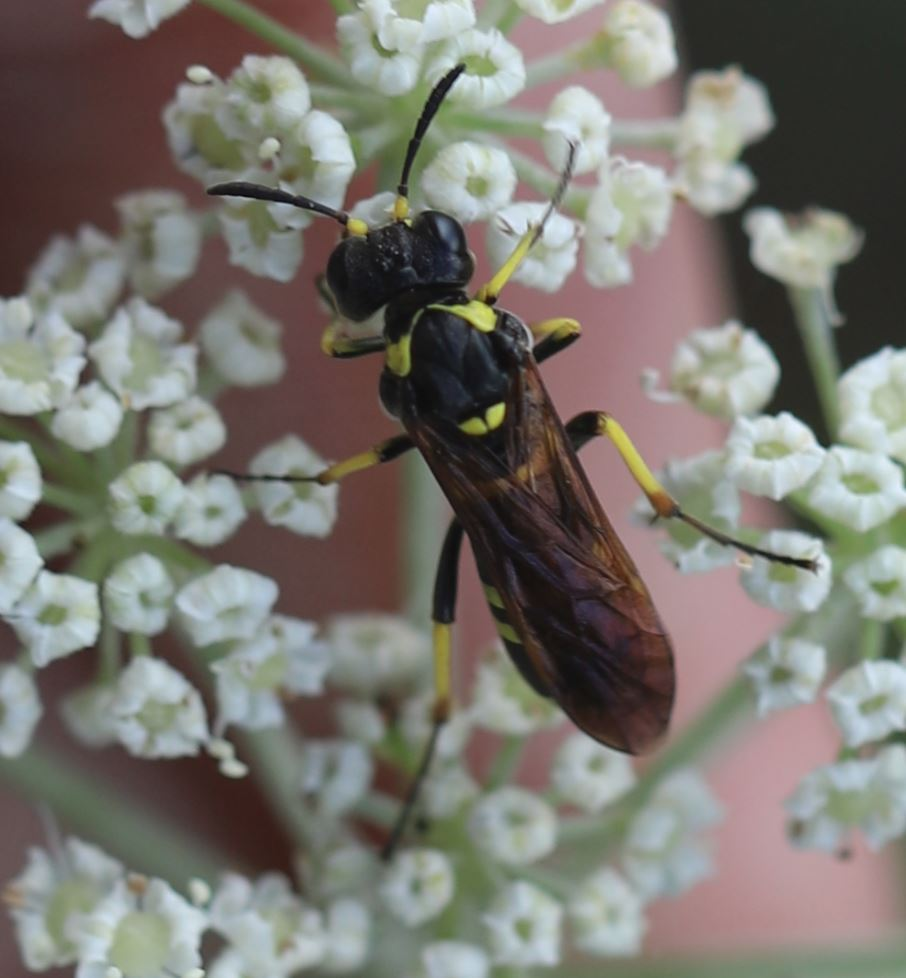 Blattwespe Tenthredo marginella am 22. August 2020 in der Schwetzinger Hardt